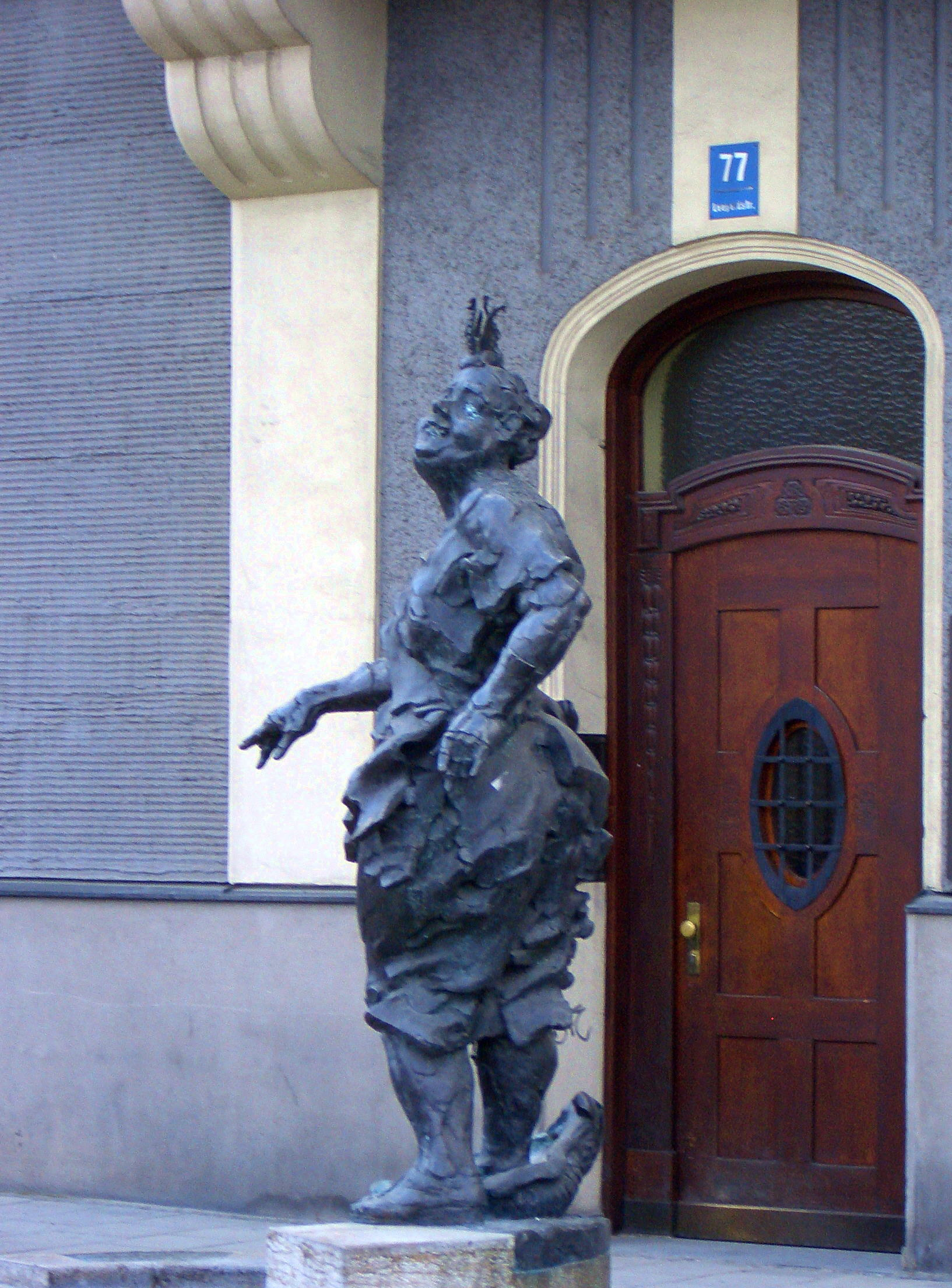 Bally-Prell-Brunnen in München von Wolfgang Sand